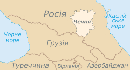 Мапа Чечні